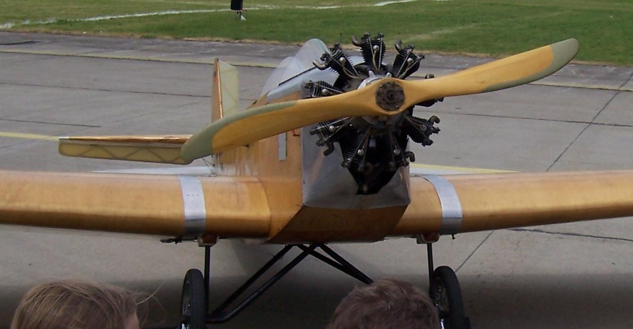 Vintage aircraft Klemm Kl 25 (also: Klemm L 25). Photograph taken myself at Internationale Luft- und Raumfahrtausstellung 2006, Berlin, Germany. Public Domain.